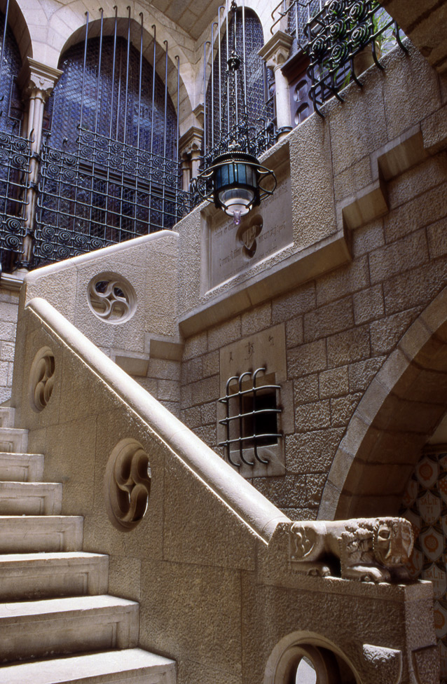 Restauració i reforma d'un casal del segle XVI.